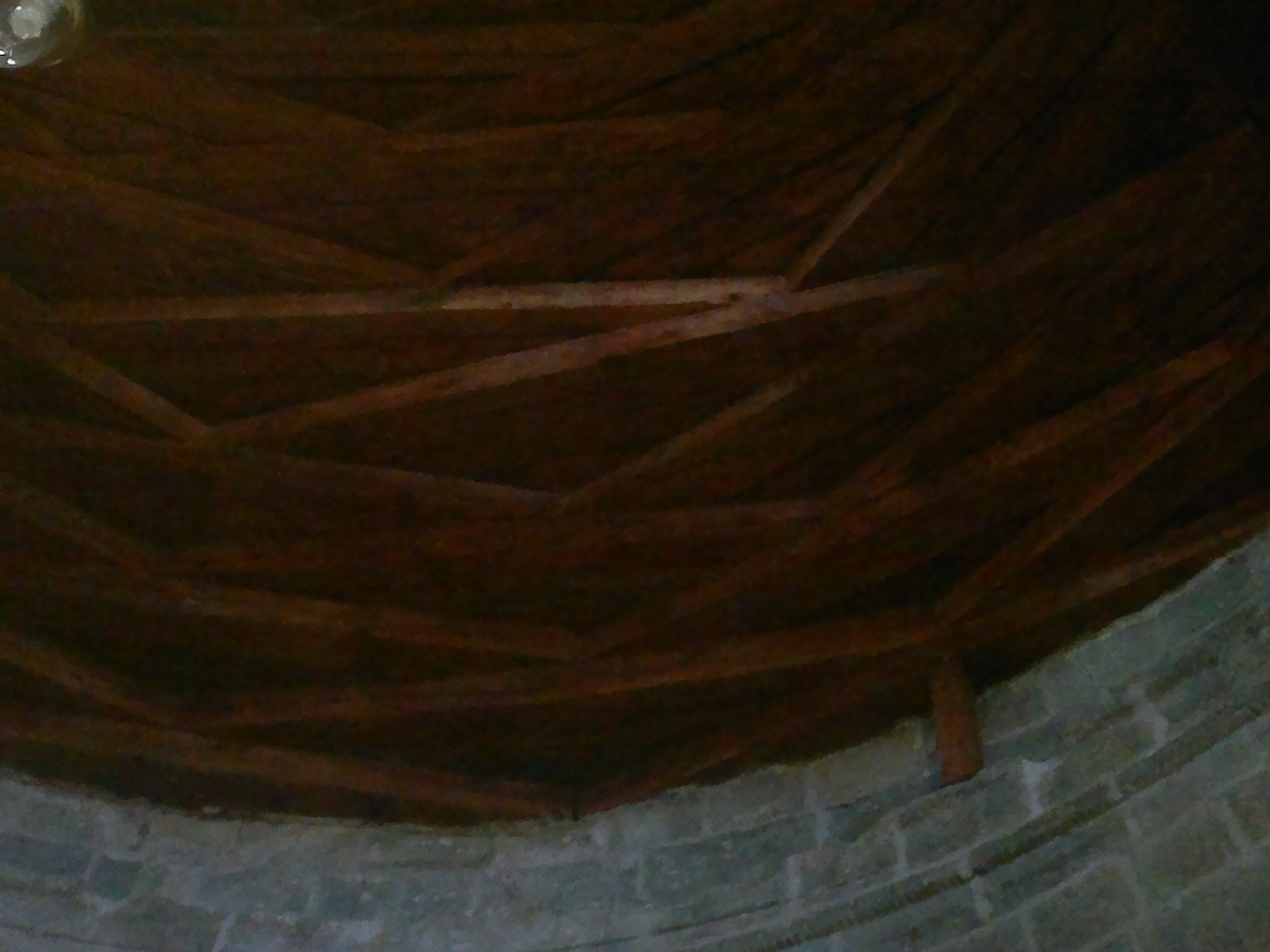 Erzurum Ulu Camii Kırlangıç kubbe iç görünümü